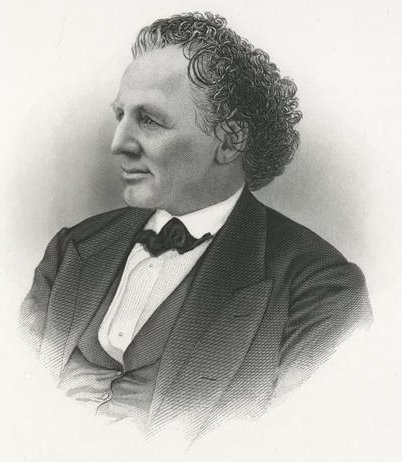 Benjamin Babbitt (1809-1889)